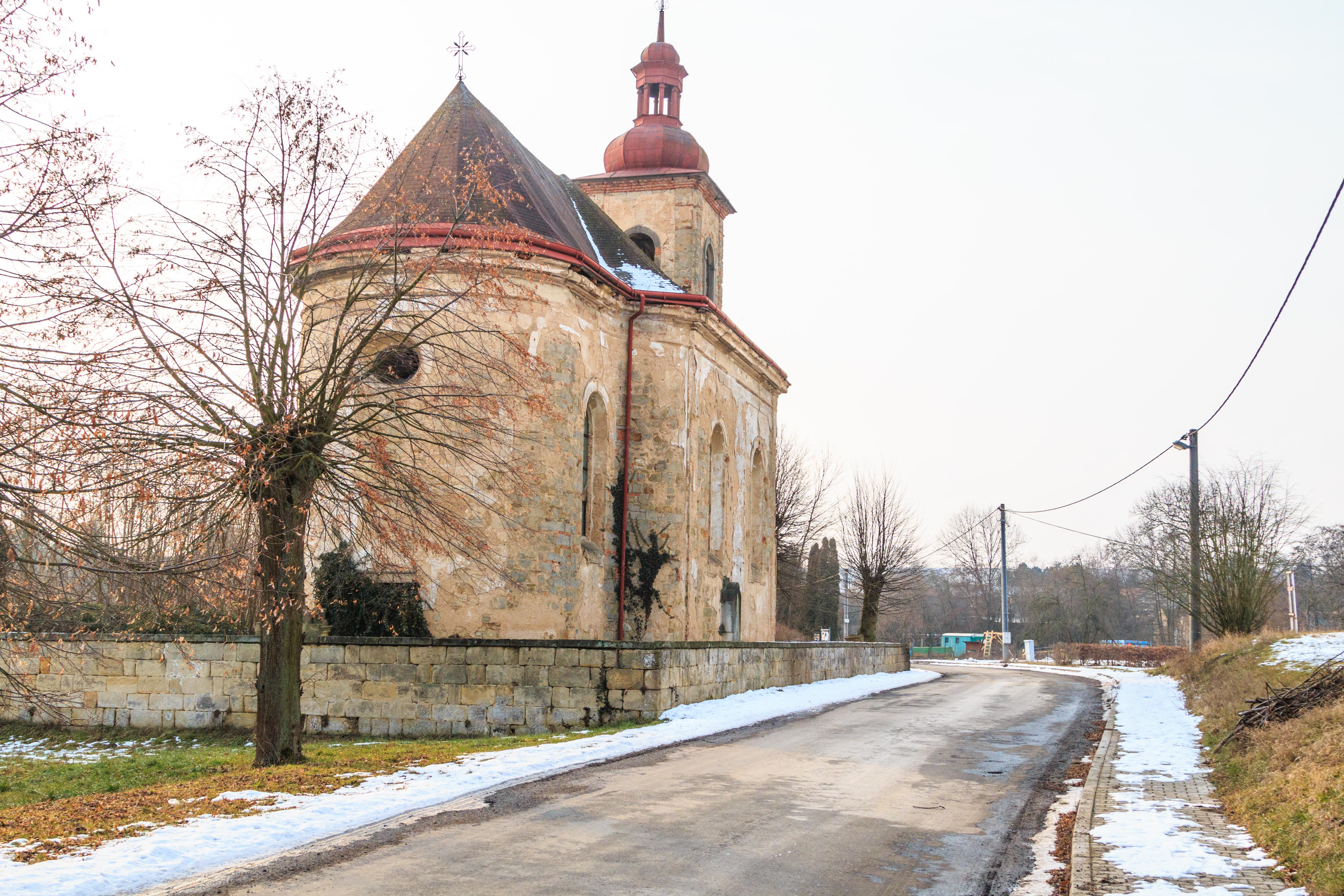 Kostel svatého Matouše, Dolany (Jičíněves).